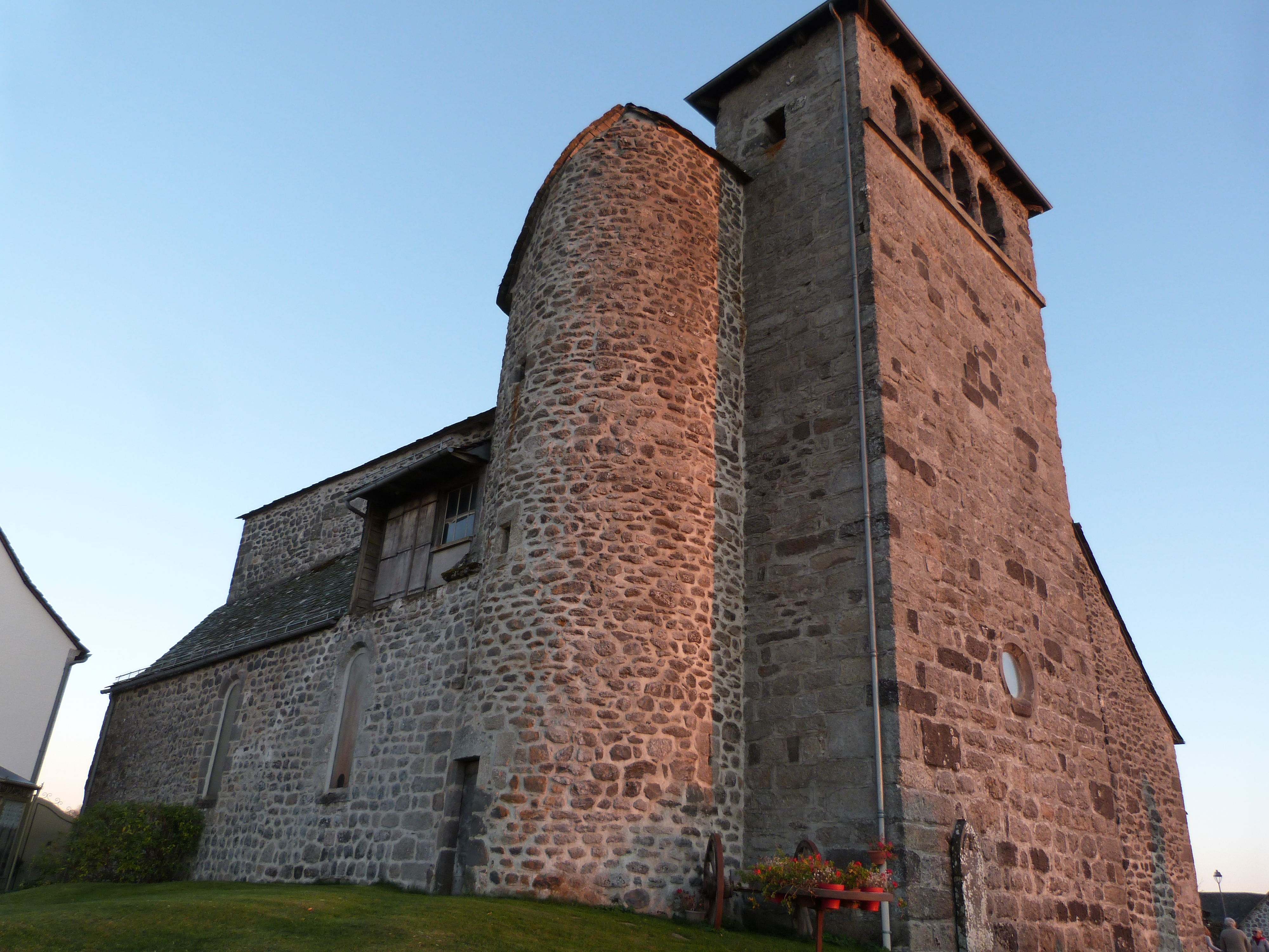 Eglise Saint-Michel de Vitrac-en-Viadène (Aveyron)